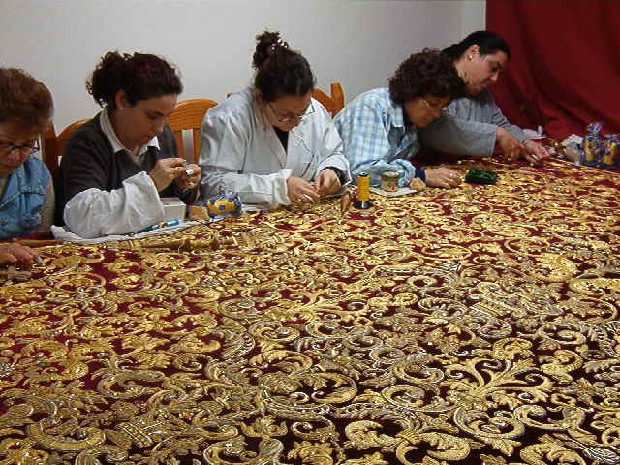 Eigen foto, borduren